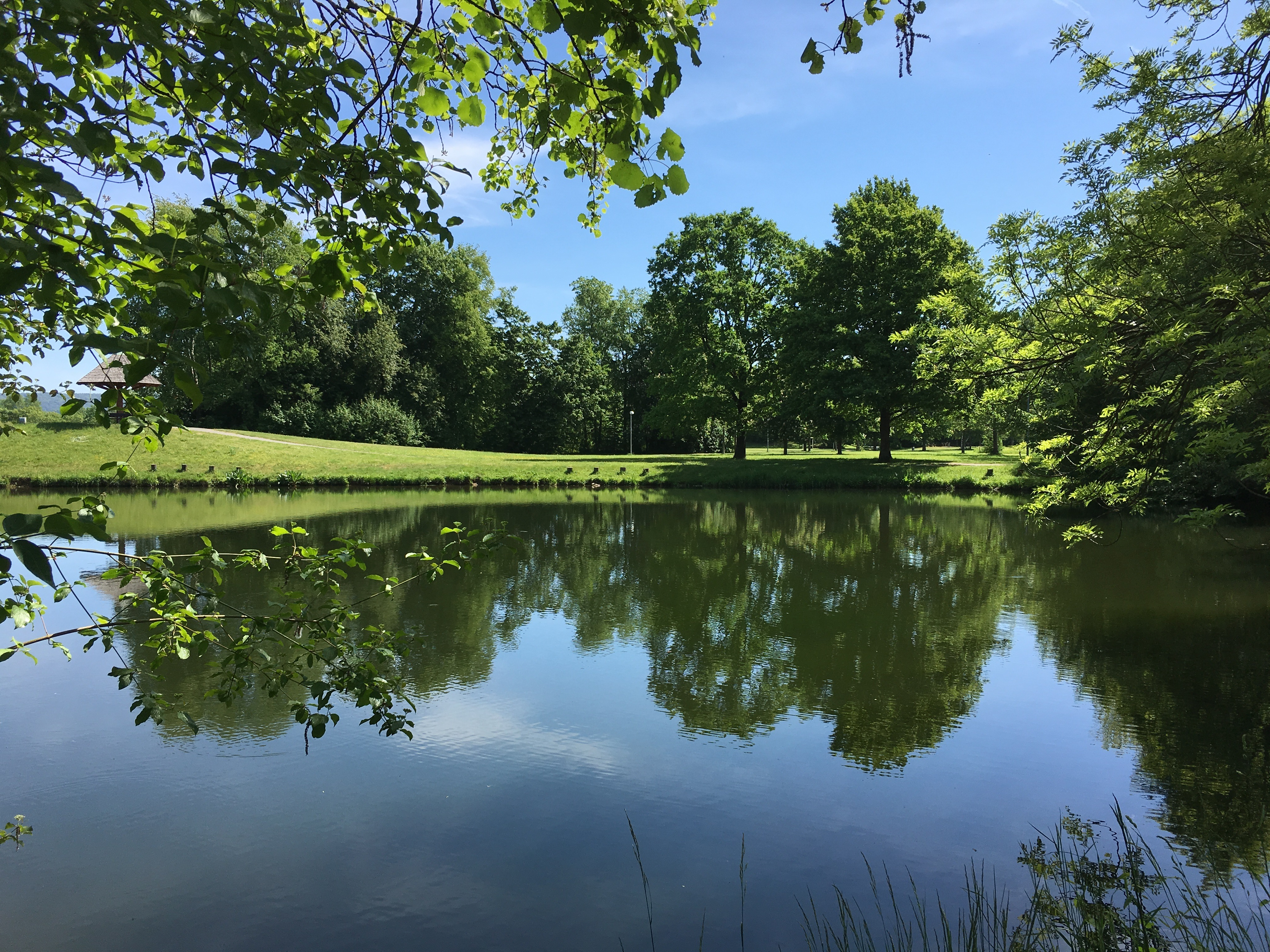 (LSG:BY-LSG-00073.01)_Schutz von Landschaftsteilen im Landkreis Forchheim (LSG Burk)